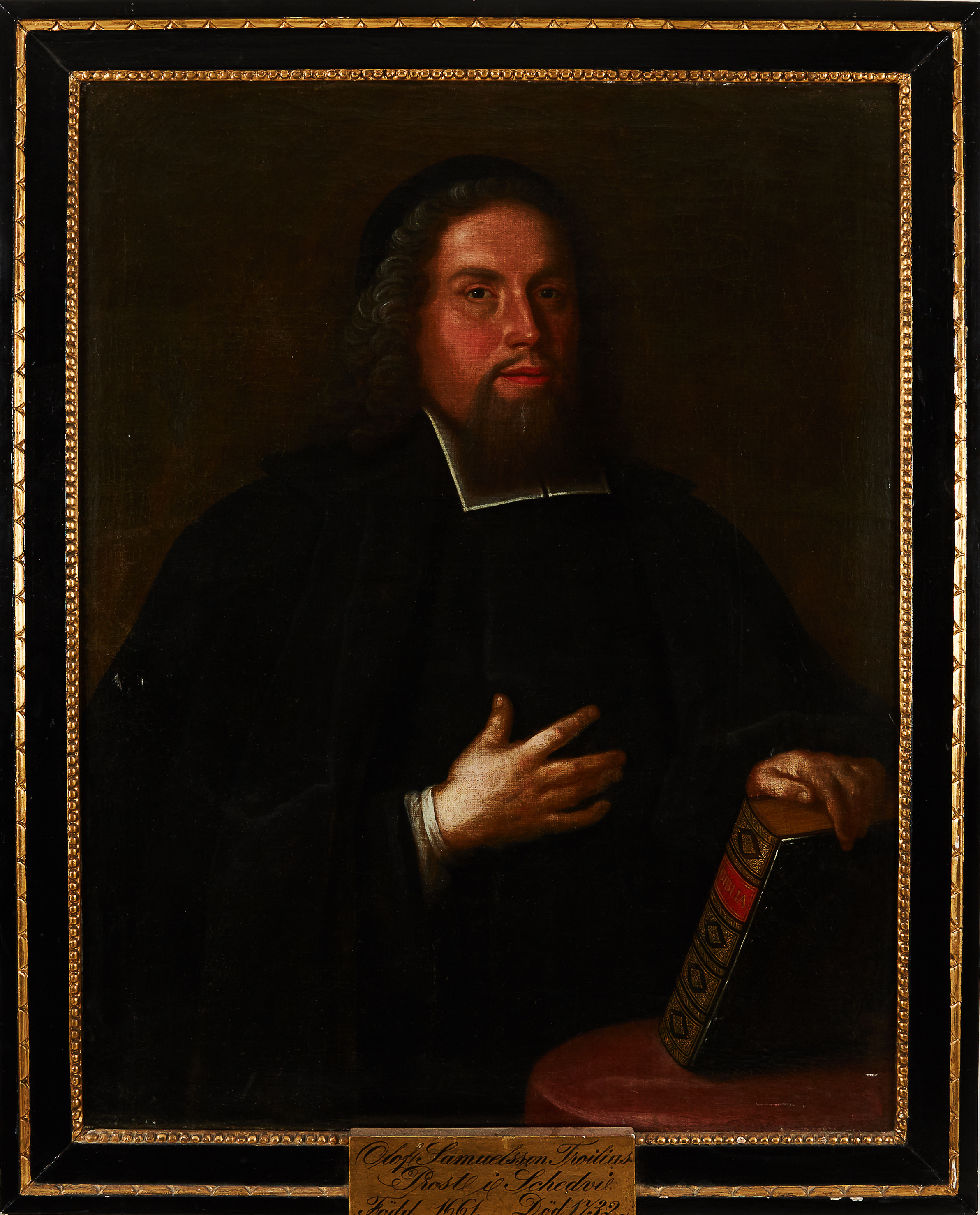 Porträtt av Olof Samuelsson Troilius (1661-1732), olja på duk, ca 95x73 cm. Konstnär okänd, men målad tidigt 1700-tal.